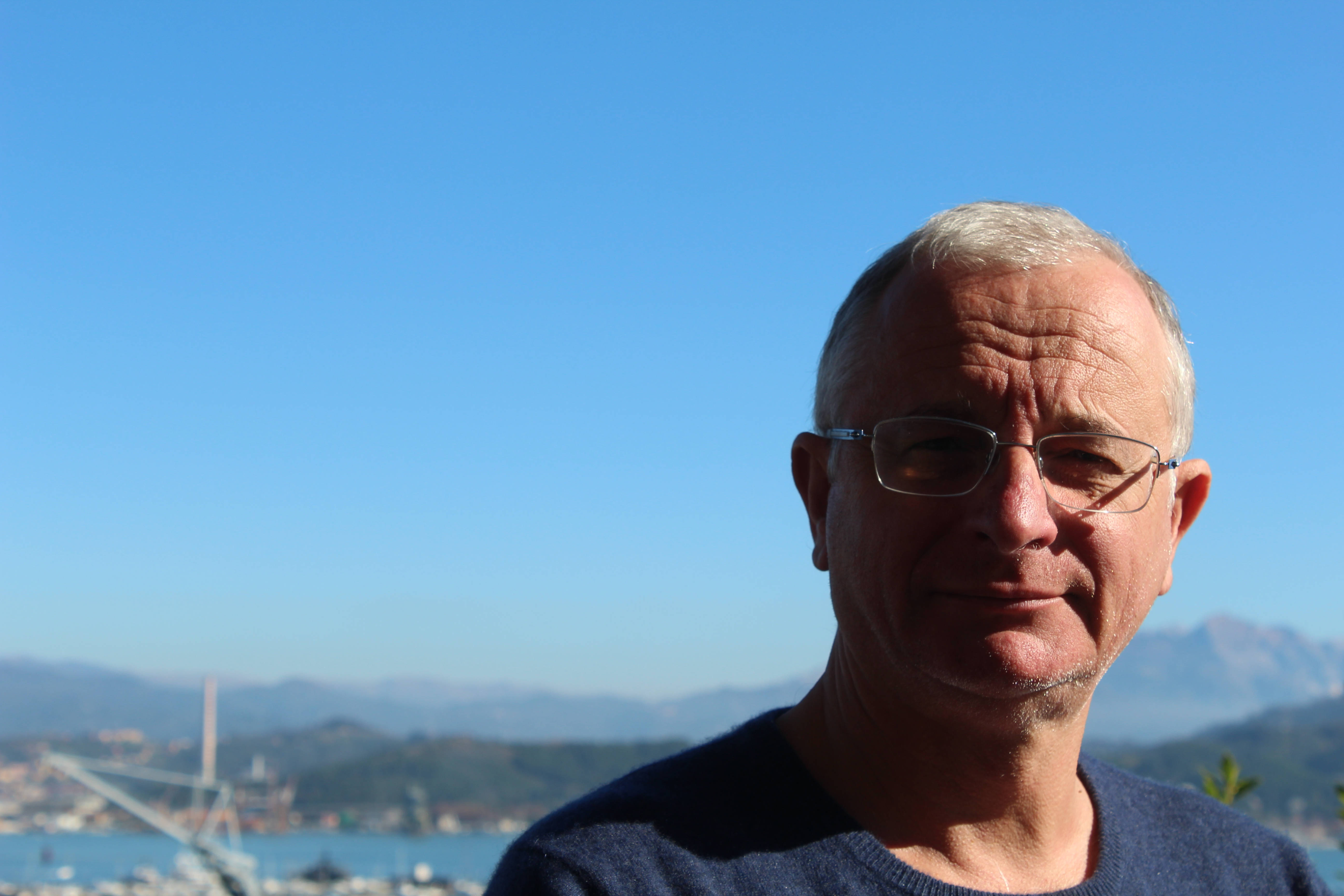 Foto di Alberto Cavanna